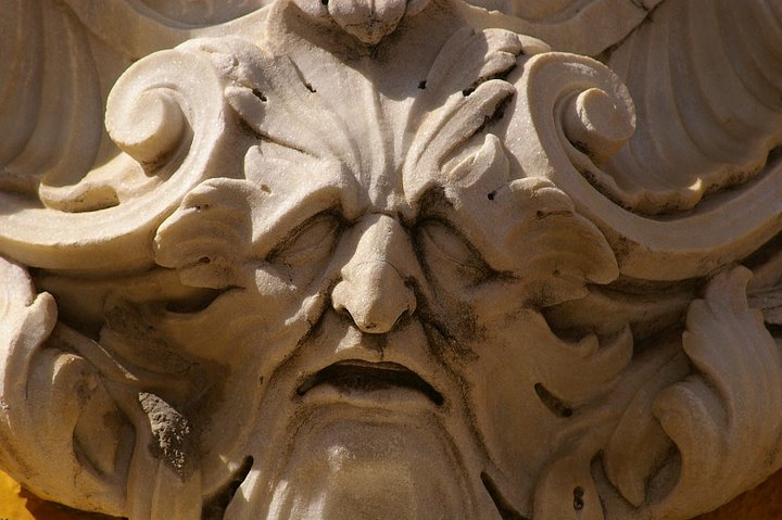 Detalle del escudo del apeadero de la Casa de Arizón en Sanlúcar de Barrameda